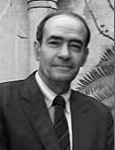 foto di Miles 1960